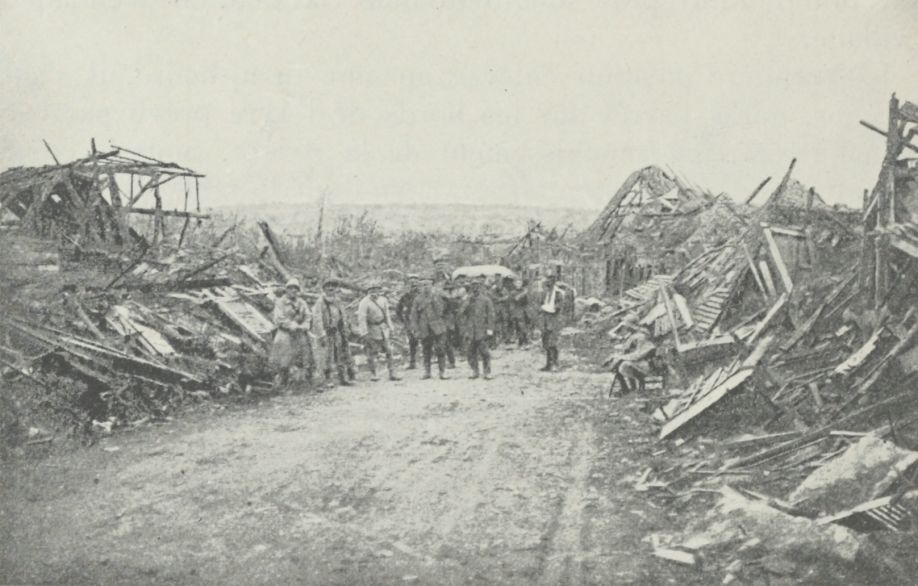 La colonne des prisonniers de Moreuil [8 août 1918] en route vers le P. C. de division.Autre légende : Les prisonniers boches dans Moreuil (8 août 1918)